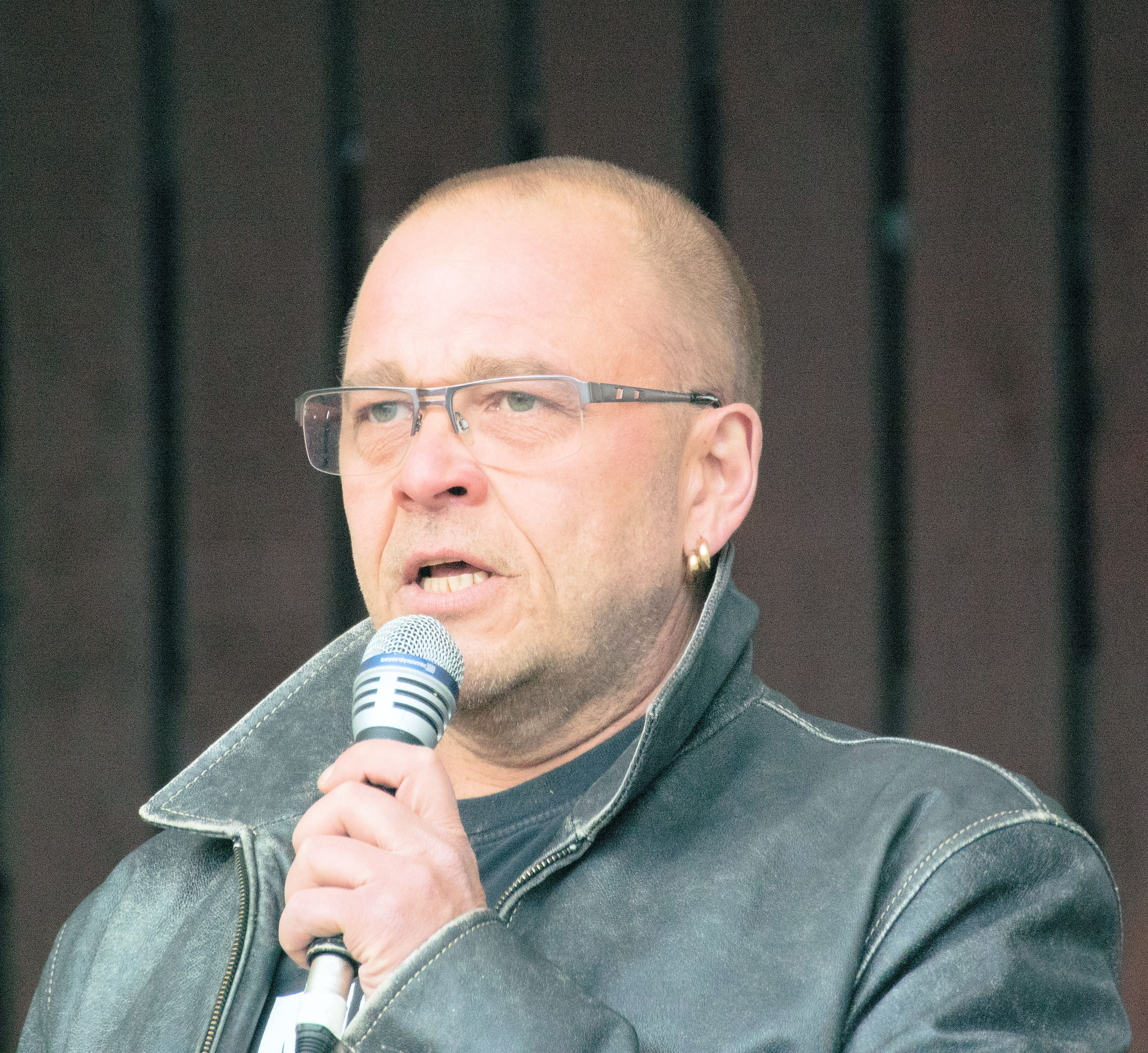 Iku Viitanen suomalainen selostaja